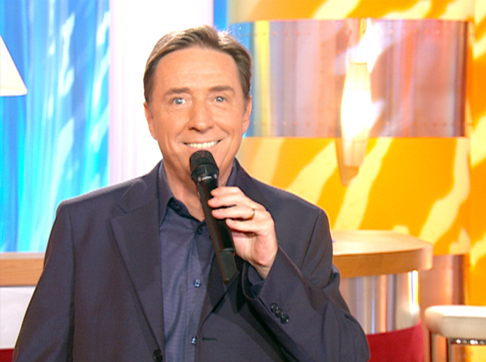 Pascal Sevran au cours d'un tournage de "Chanter la vie" 31 octobre 2003 - Réalisateur Gérard Marchadier - Directeur de la photo David Seligmann-Forest